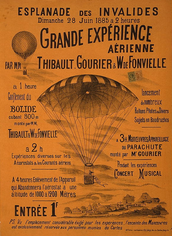 Poster advertising a balloon ascension by French balloonist Wilfrid de Fonvielle (1824-1914) and others. "Grande expérience aérienne par MM Thibault, Gourier & W. de Fonvielle. Esplanade des invalides. Dimanche 28 juin 1885 a 2 heures."